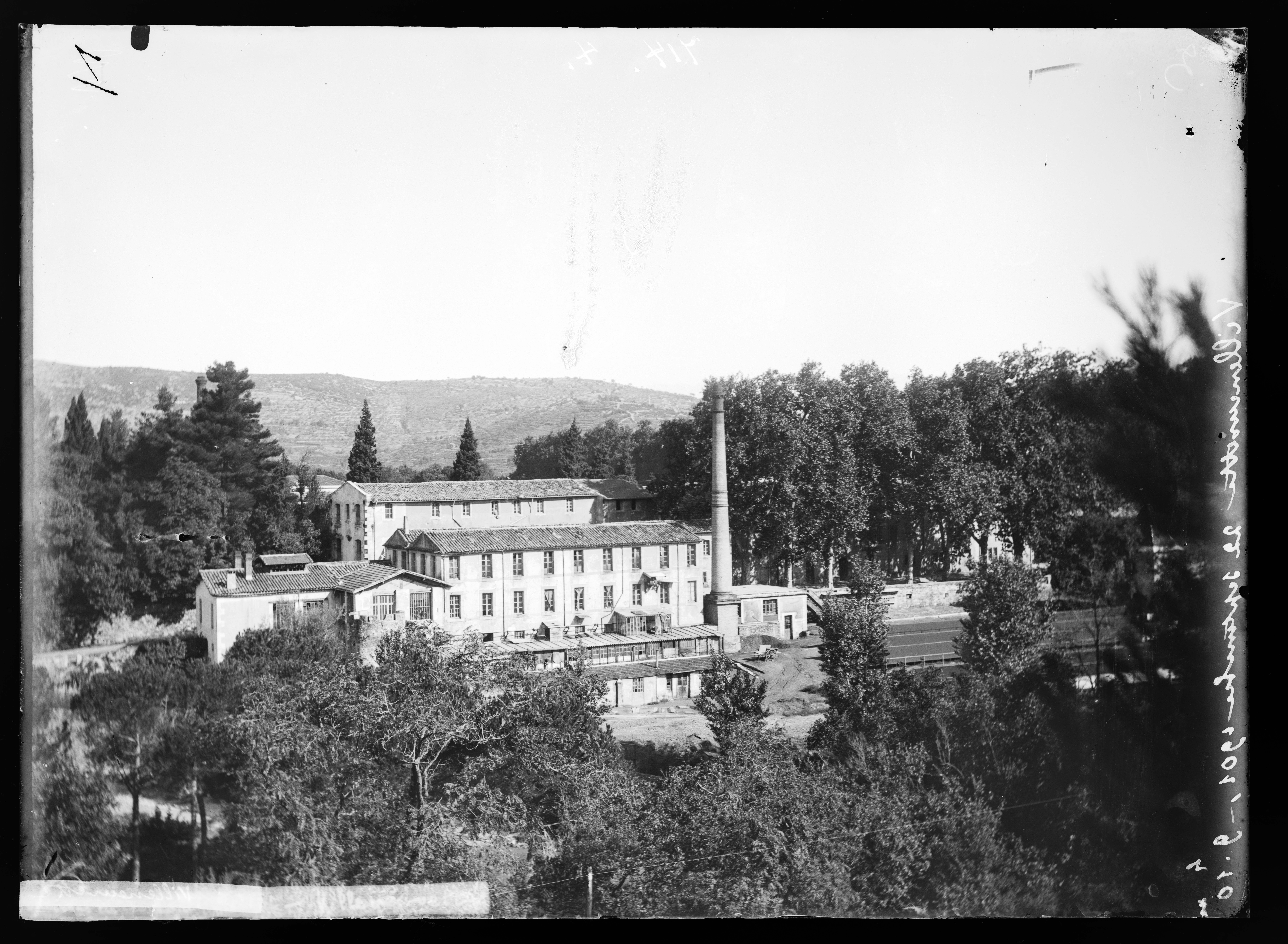 Villeneuvette. - [Usine] : photographie réalisée le 22 septembre 1901.